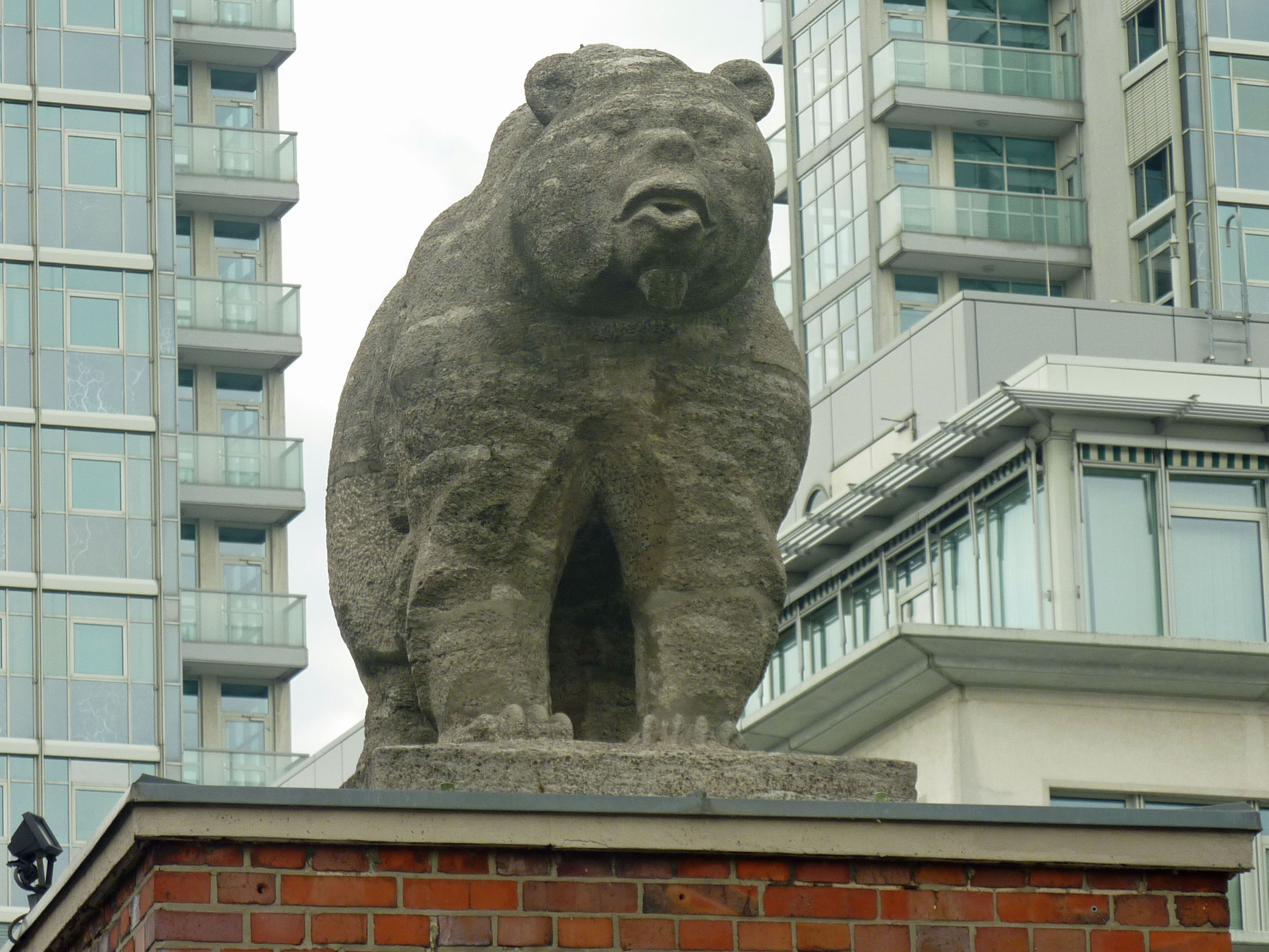 Skulptur 'Bär' aus Muschelkalkstein von Arminius Hasemann (1927/38), in Berlin-Alt-Treptow, Eichenstraße 4.